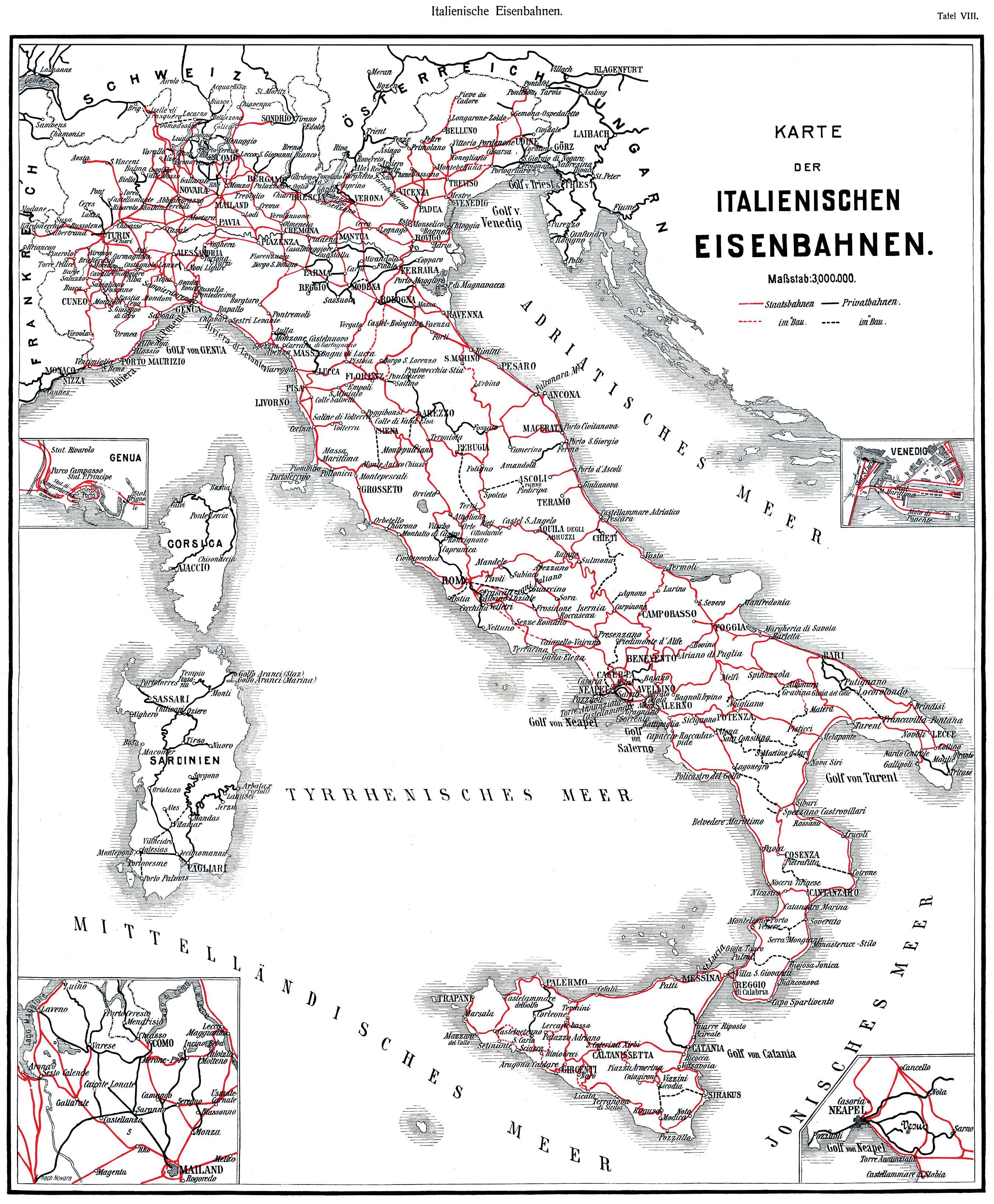 Karte der Italienischen Eisenbahnen